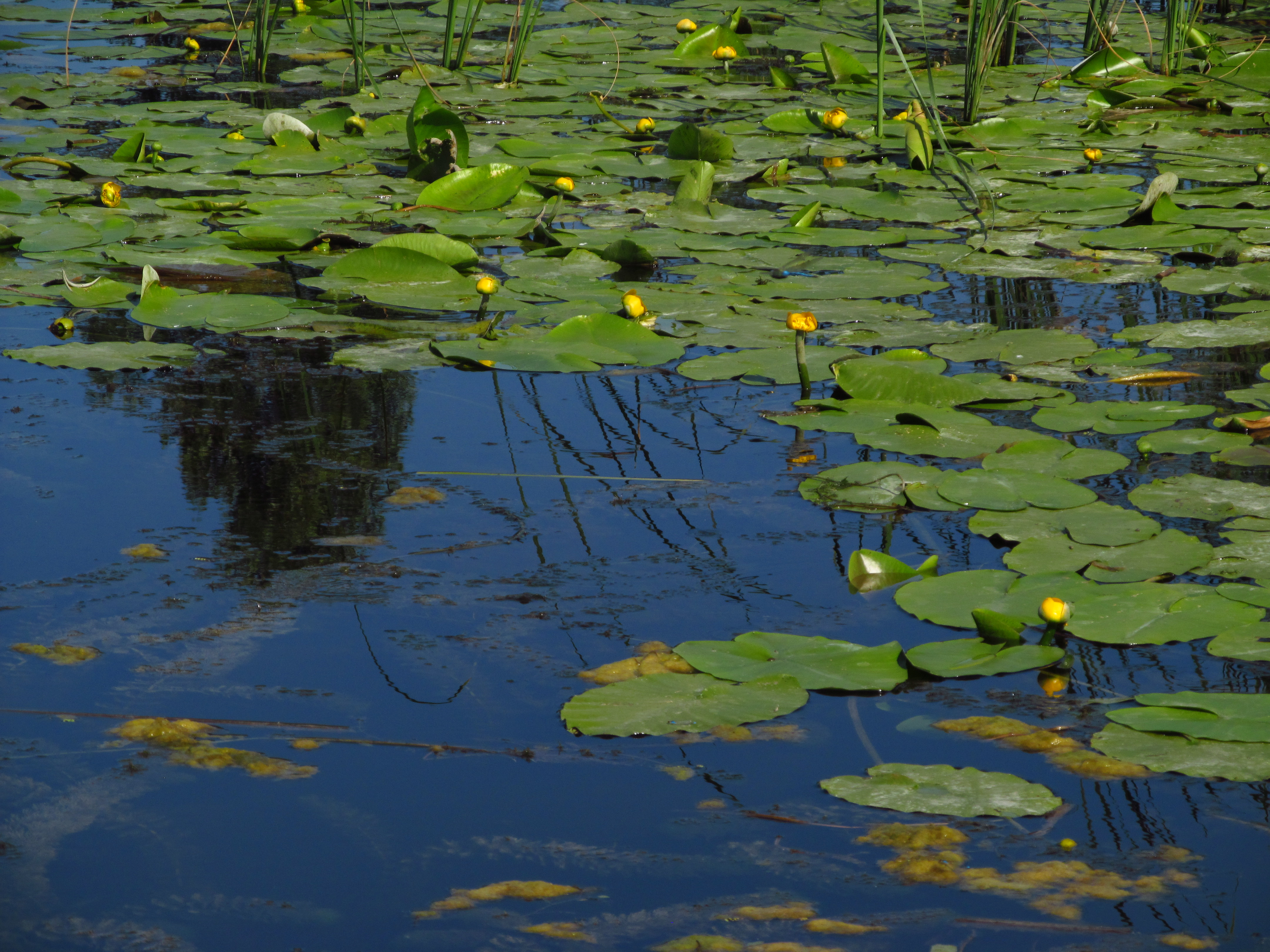 Srpski (latinica): žuti lokvanj (Nuphar luteum)